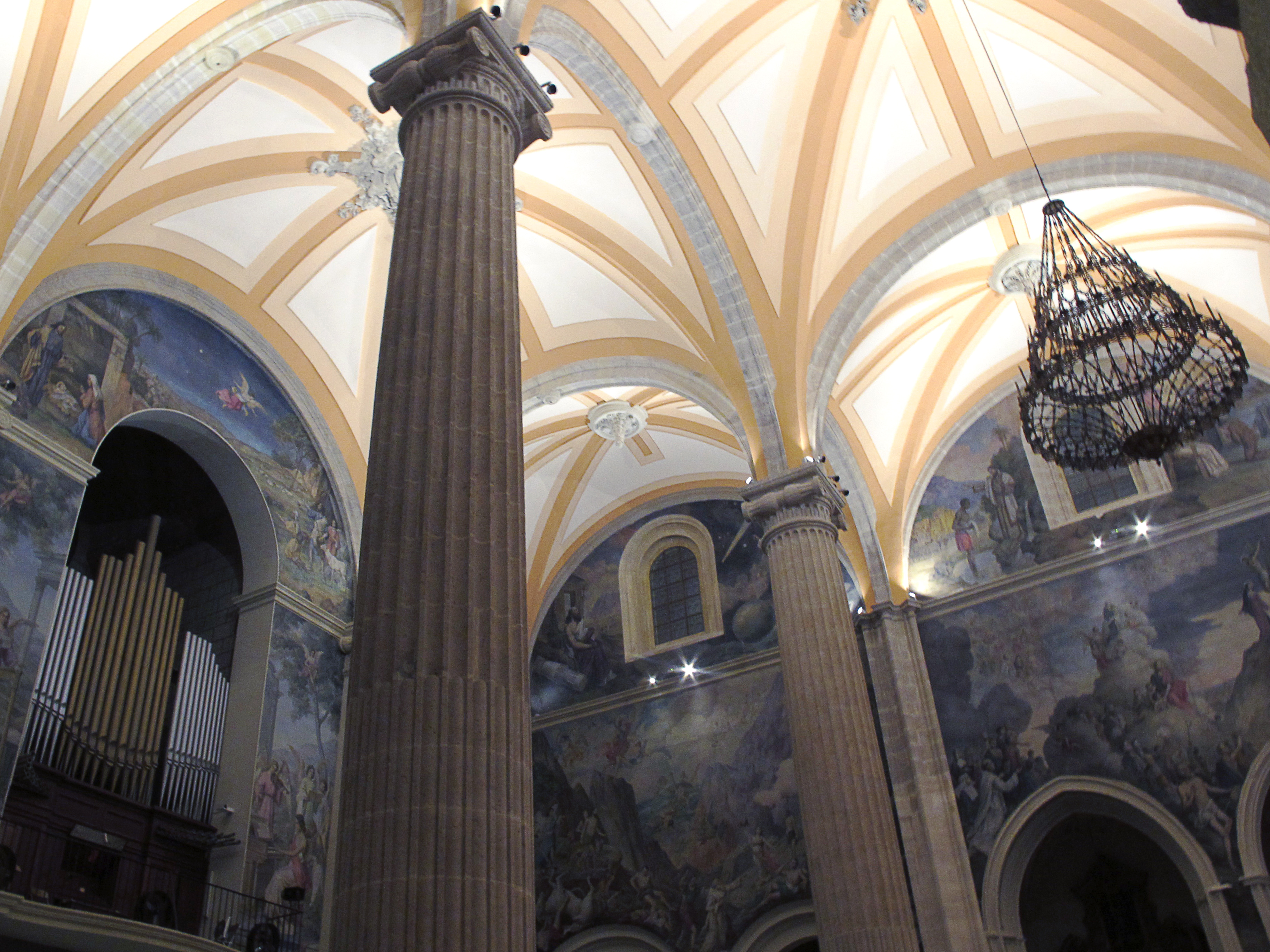 Órgano Catedral de Albacete